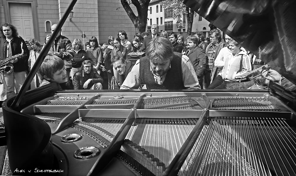 Alexander von Schlippenbach, Globe Unity Ochestra, Open Air Konzert in Wuppertal (Laurentiusplatz), 1970-er Jahre